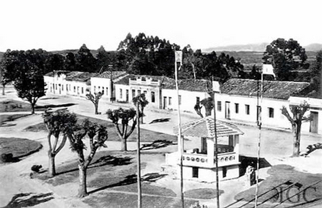 Praça de Itaquaquecetuba, foto tirada da Igreja Matriz em 1953.